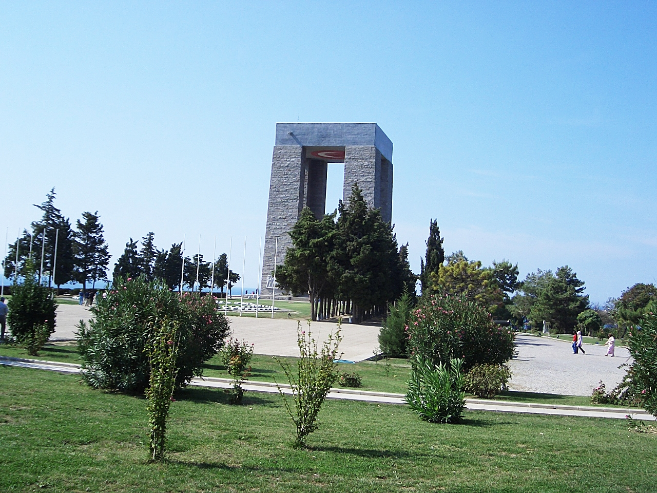 Çanakkale Şehitleti Anıtı CASIO QV-R41 model makineyle çekim. 24.09.2007 11:42 Selçuk Bağrışen